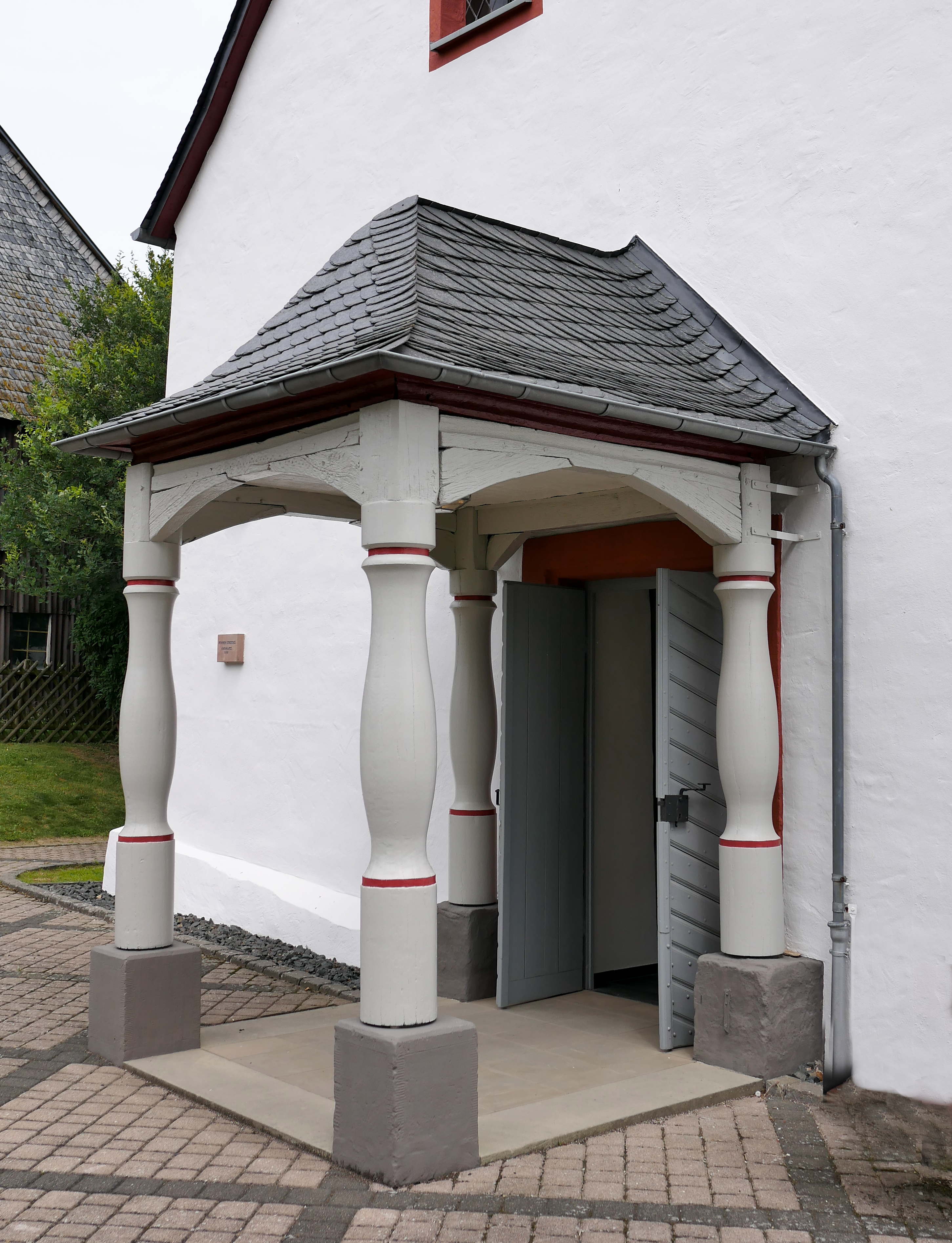 Evangelische Kirche Hirschfeld (Hunsrück) - Westseite Vorbau vor dem Kircheneingang